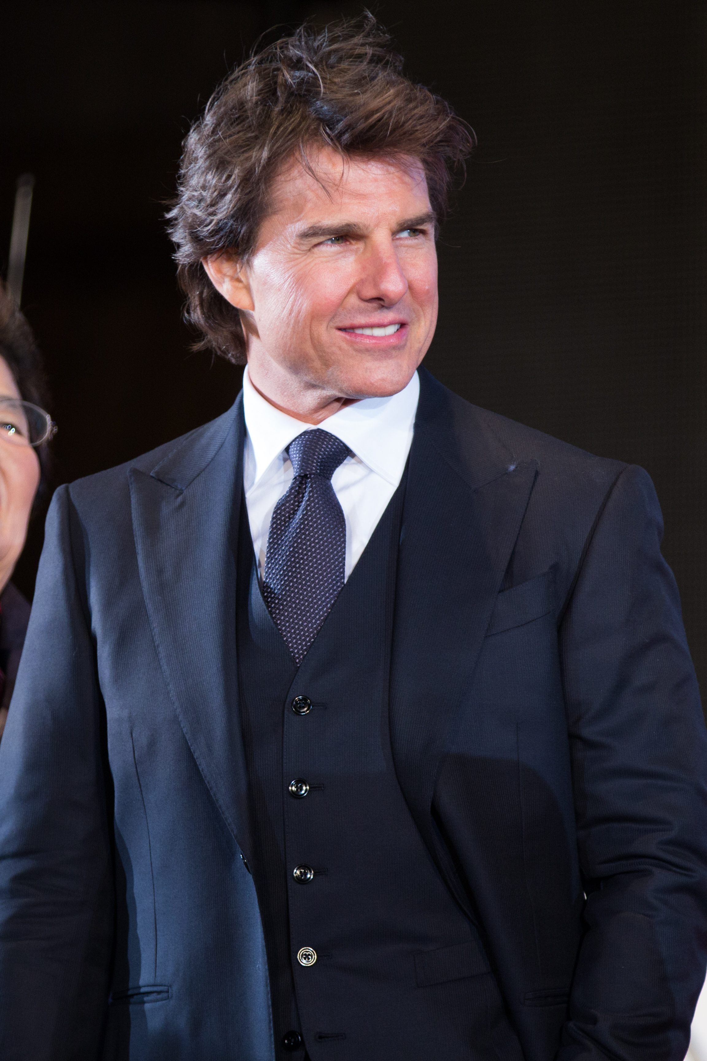 ジャック・リーチャー NEVER GO BACK ジャパン・プレミア レッドカーペット トム・クルーズ